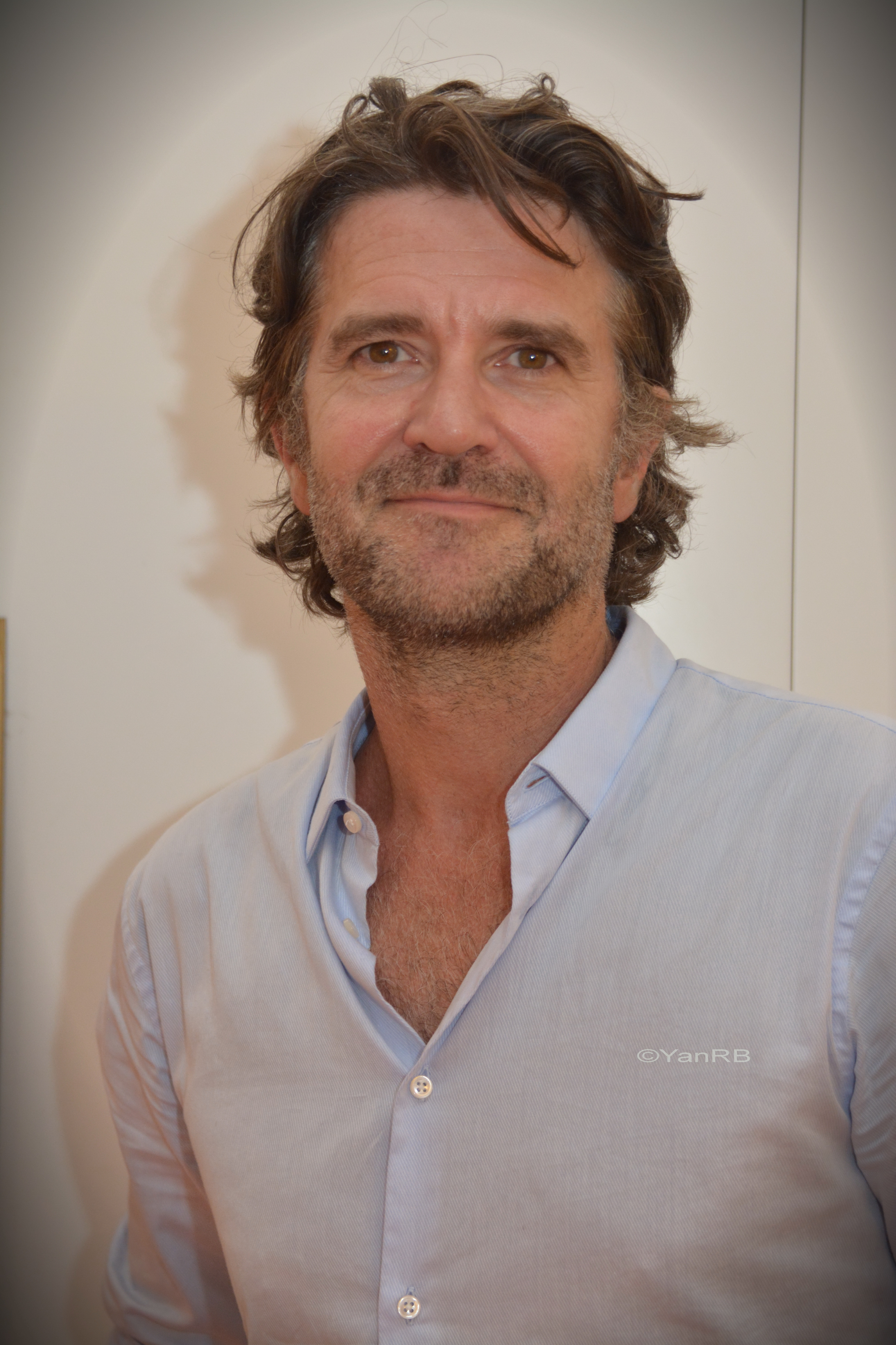 Olivier Ayache-Vidal à l'av1er de son film Les grands esprits au Gaumont Wilson Toulouse